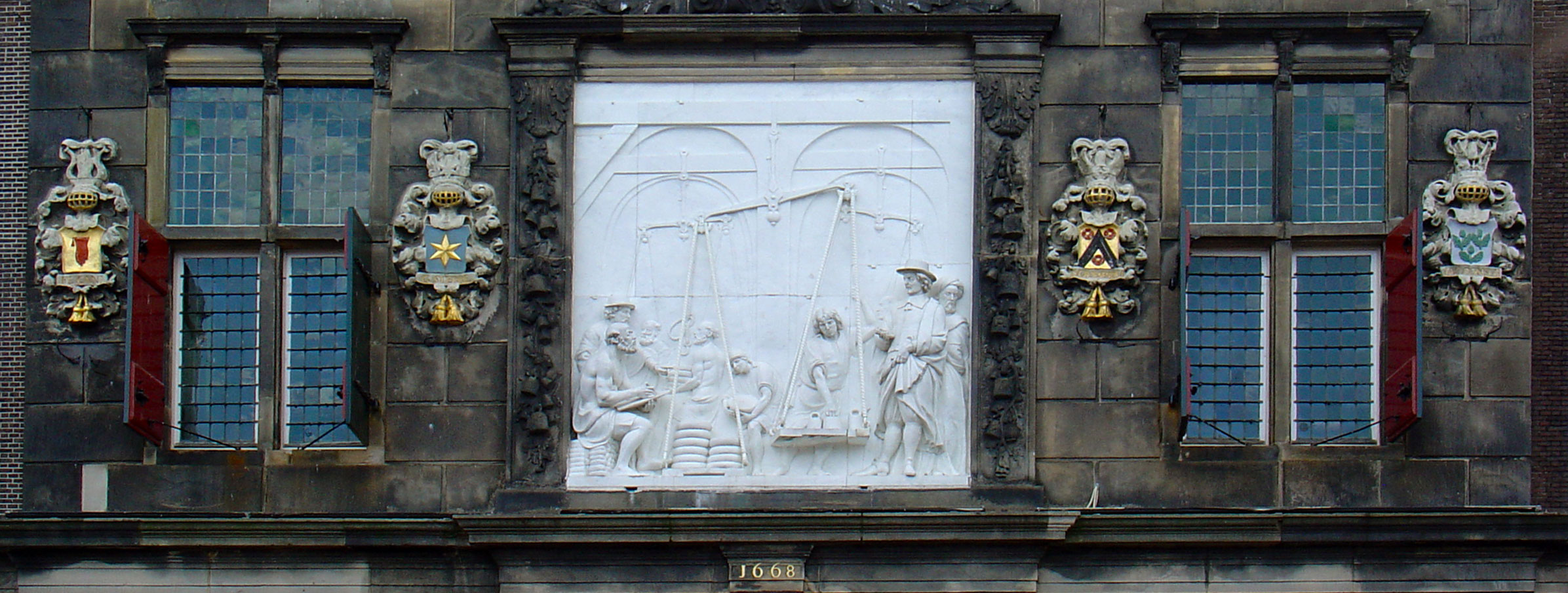 Reliëf met wapens van de burgemeesters in de gevel van de Waag op de Markt van Gouda